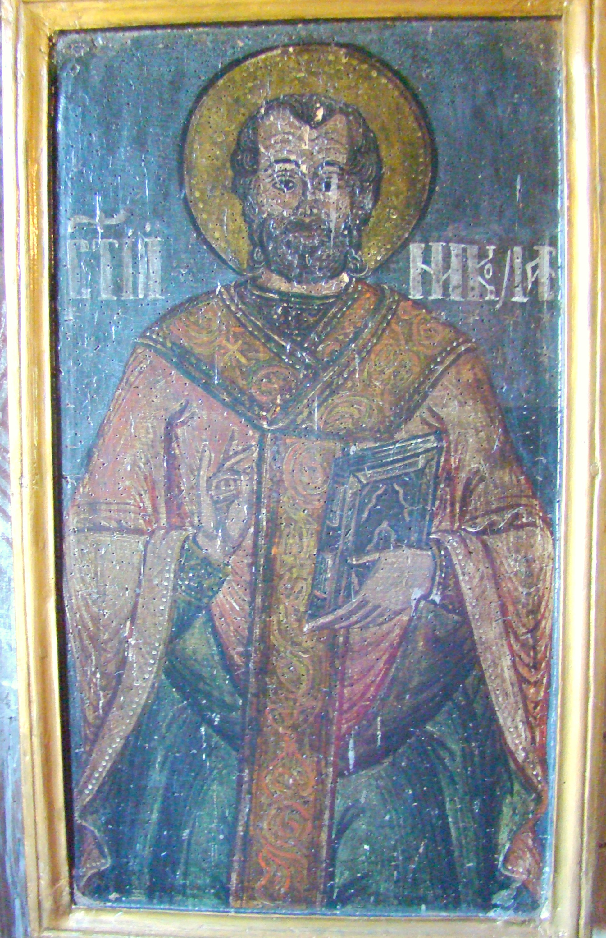 Biserica de lemn „Cuvioasa Paraschiva” din Rădulești